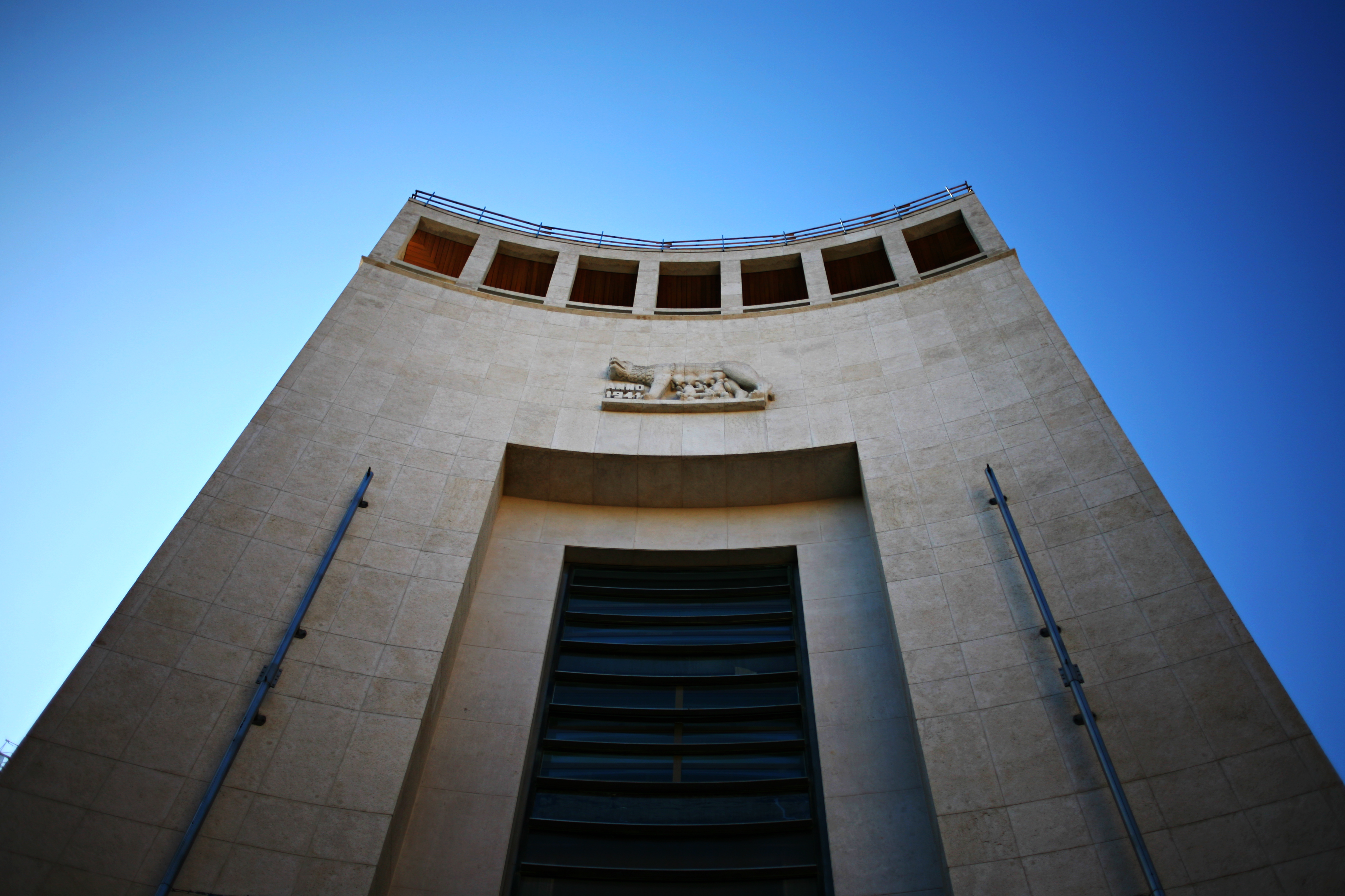 Palazzo del Banco di Roma (1939-1941) arch. Scoccimarro, Milano, facciata